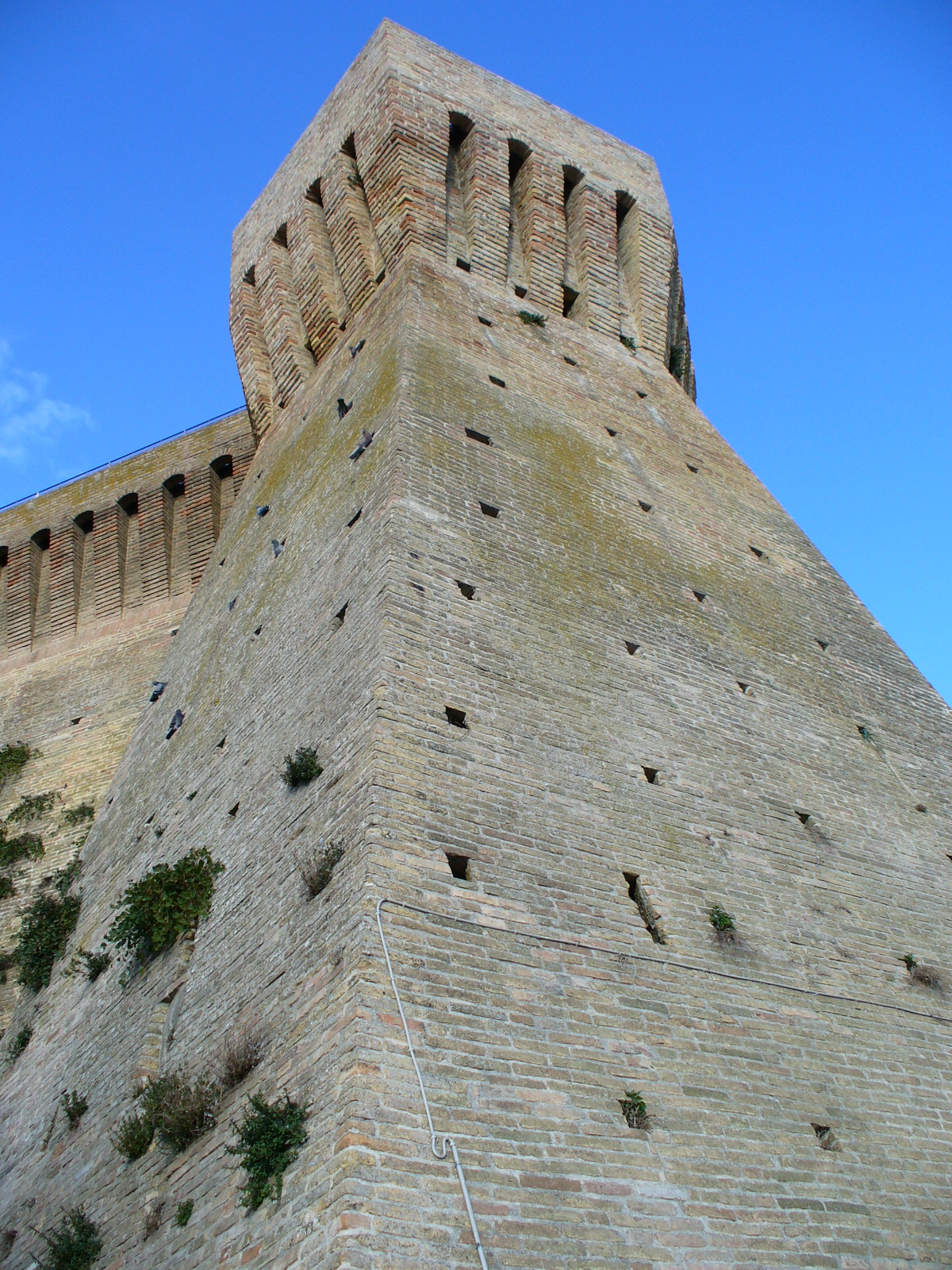 Acquaviva Picena, Marche, ItaliaAcquaviva Picena fortezza, Fortress of Acquaviva Picena Marche Italy